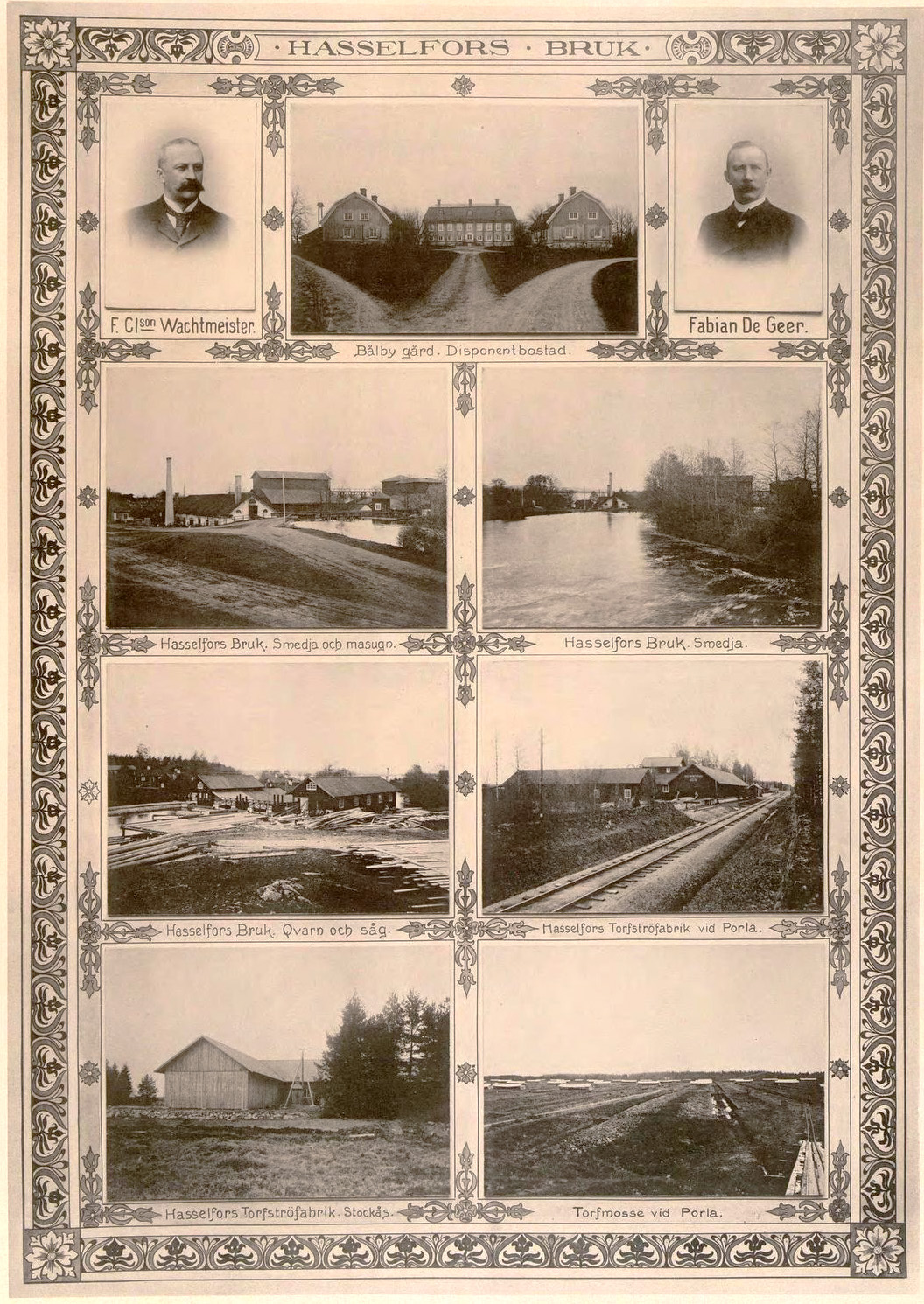 Hasselfors Bruk